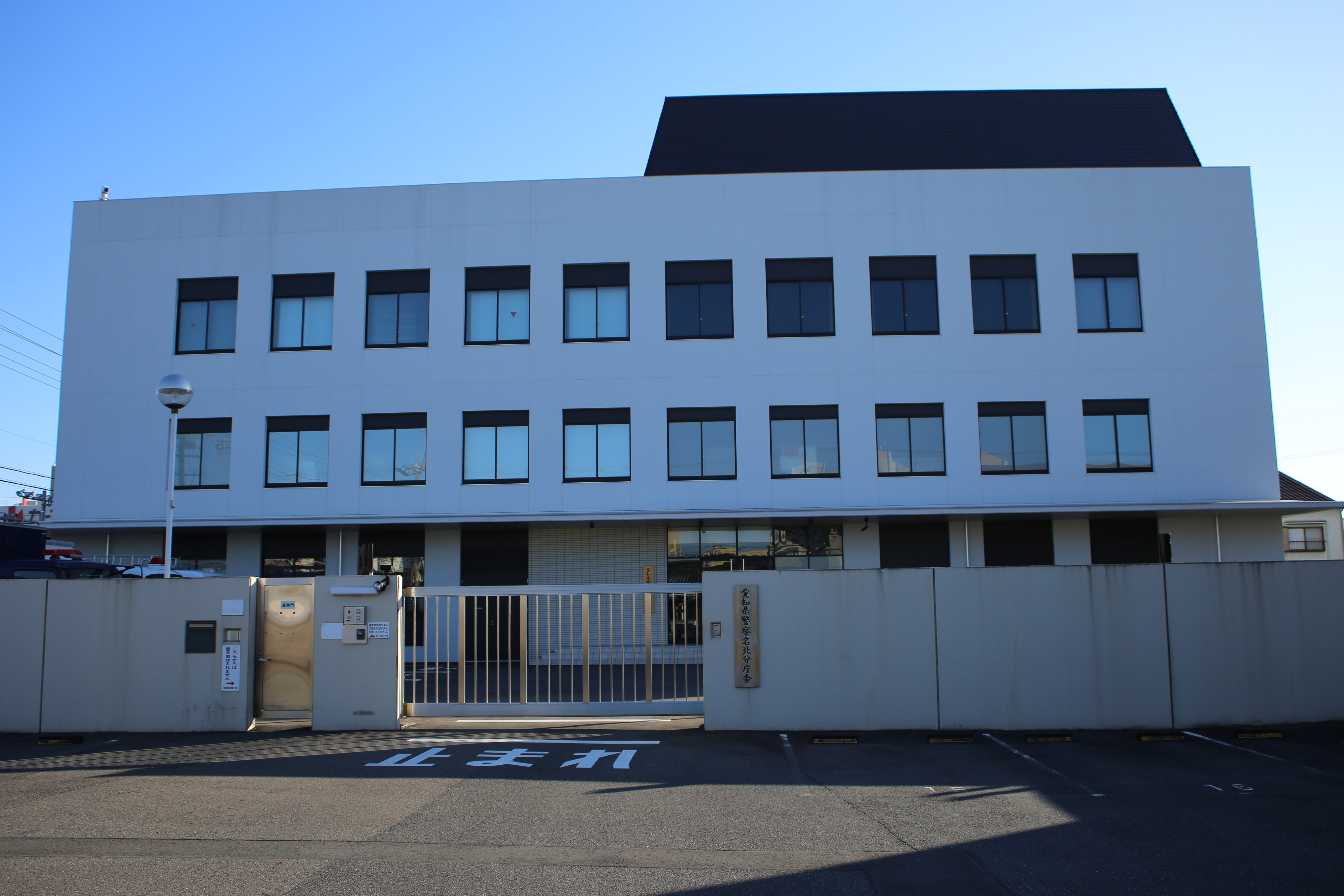 名古屋市北区水草町の愛知県警察名北分庁舎